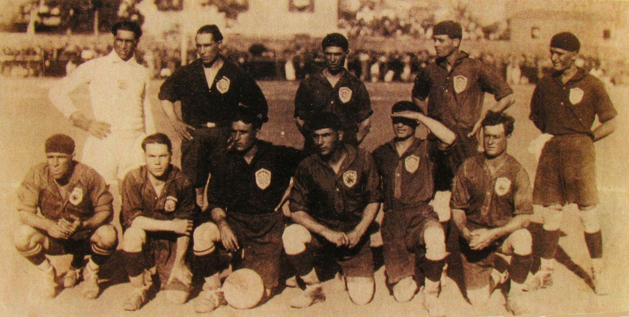 Equipa de futebol do Club Sport Marítimo, campeã de Portugal 1926. Campo Almirante Reis, Funchal, 1926. Colecção Club Sport Marítimo. Campo Almirante Reis, Funchal, ilha da Madeira.